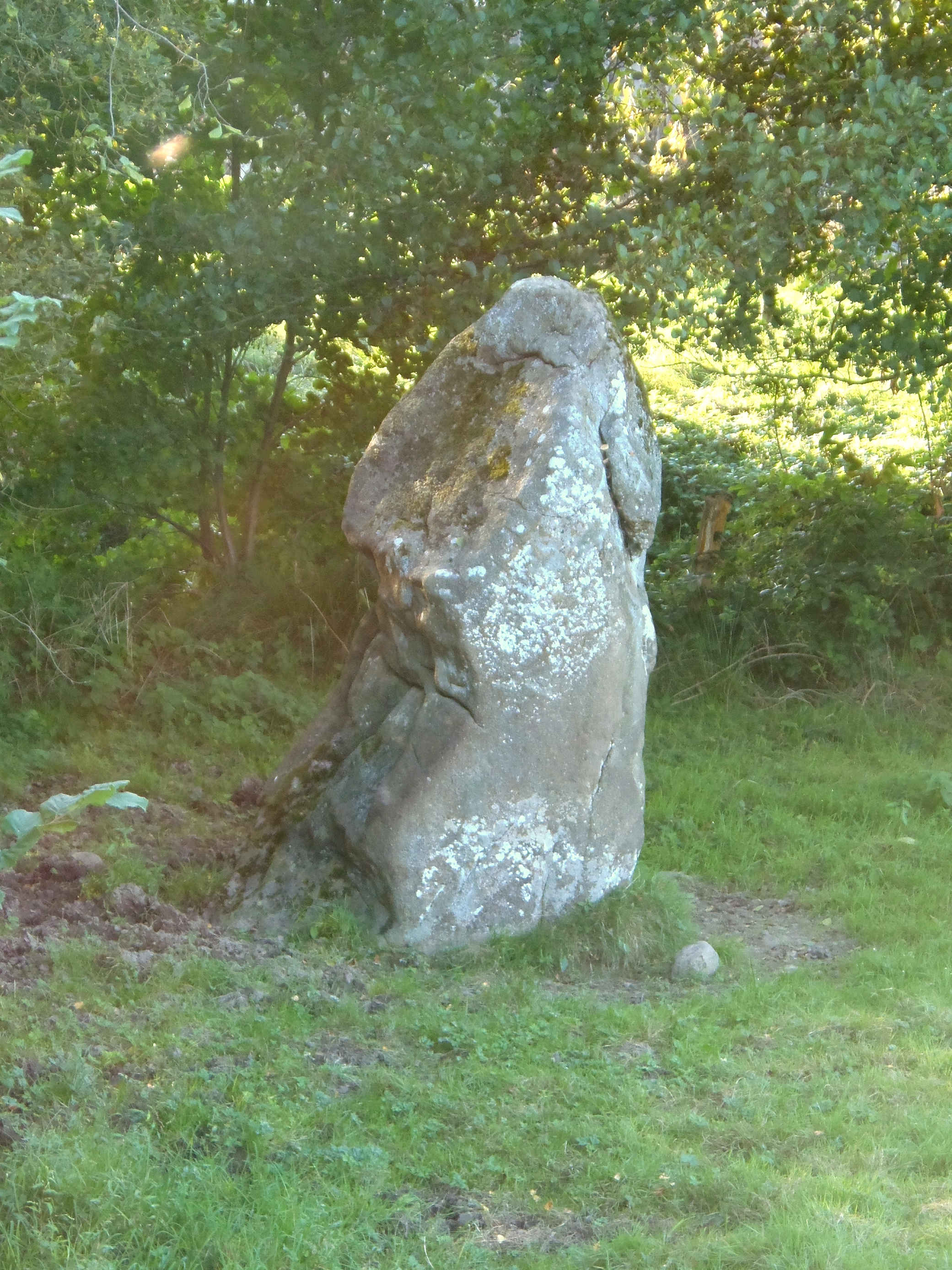 Montaudin (Pays de la Loire, France). Le menhir de la Boussardière.